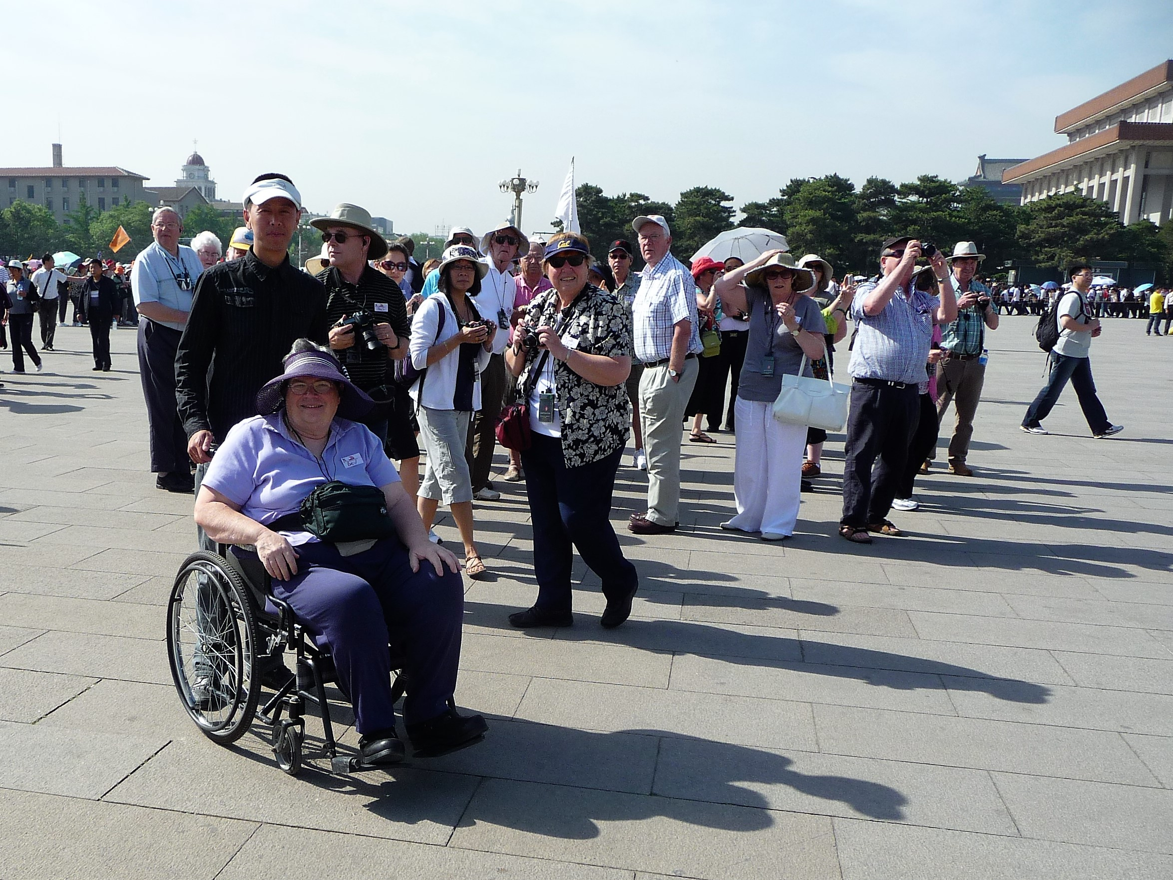 Geführter Rundgang auf dem Tian'anmen-Platz in Peking, China; wobei eine mobilitätseingeschränkte Teilnehmerin einen Rollstuhl benutzt und vom Gästeführer geschoben wird.